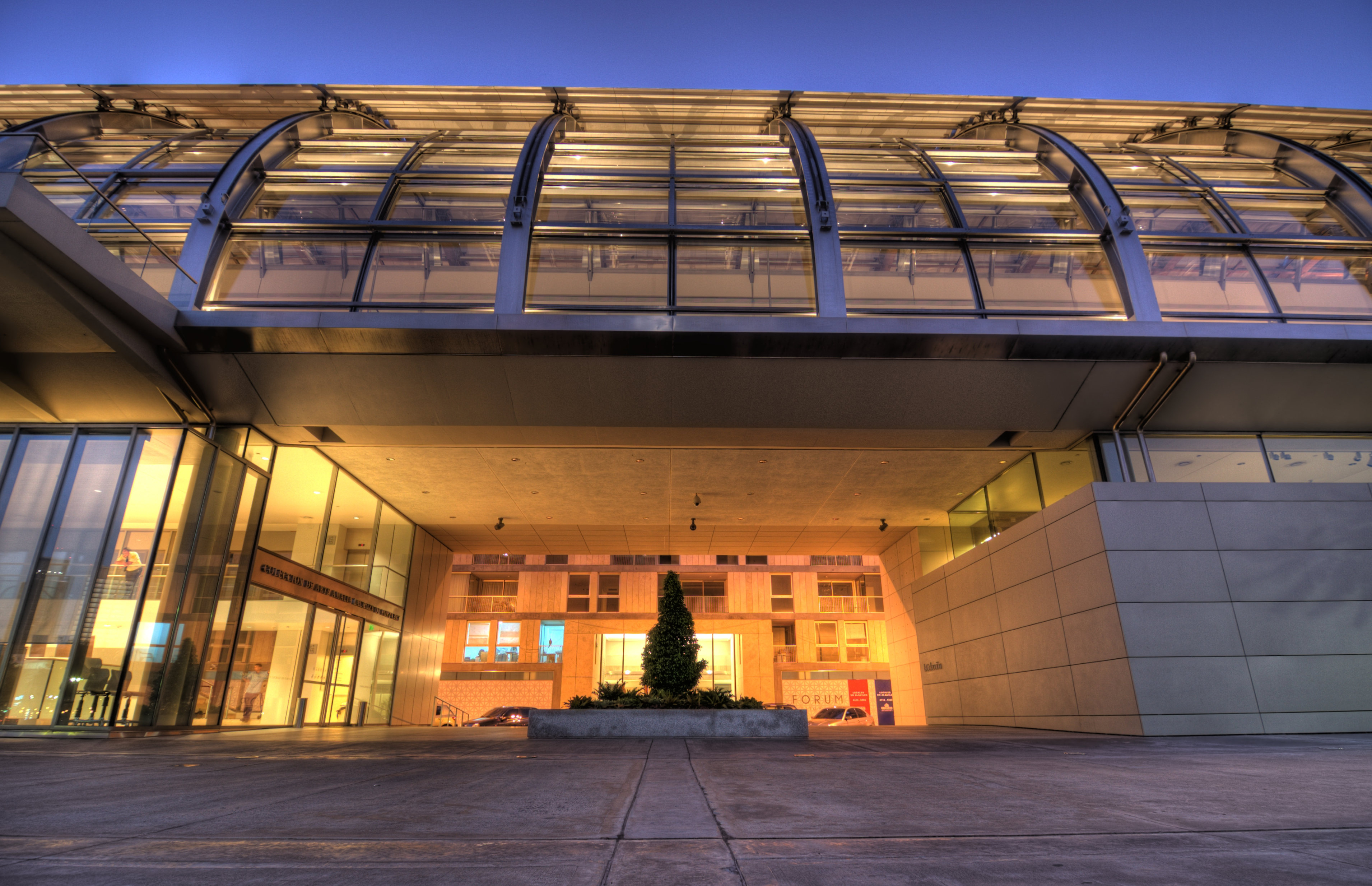 Foratbat Art Museum, Buenos Aires.